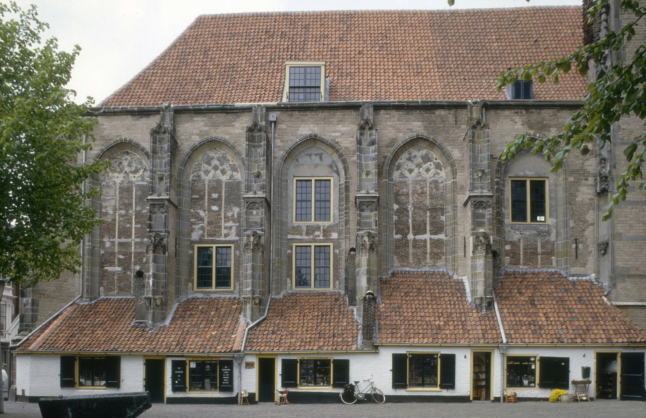 VOORMALIGE MARIAKERK: Exterieur GEVEL, ZUIDZIJDE